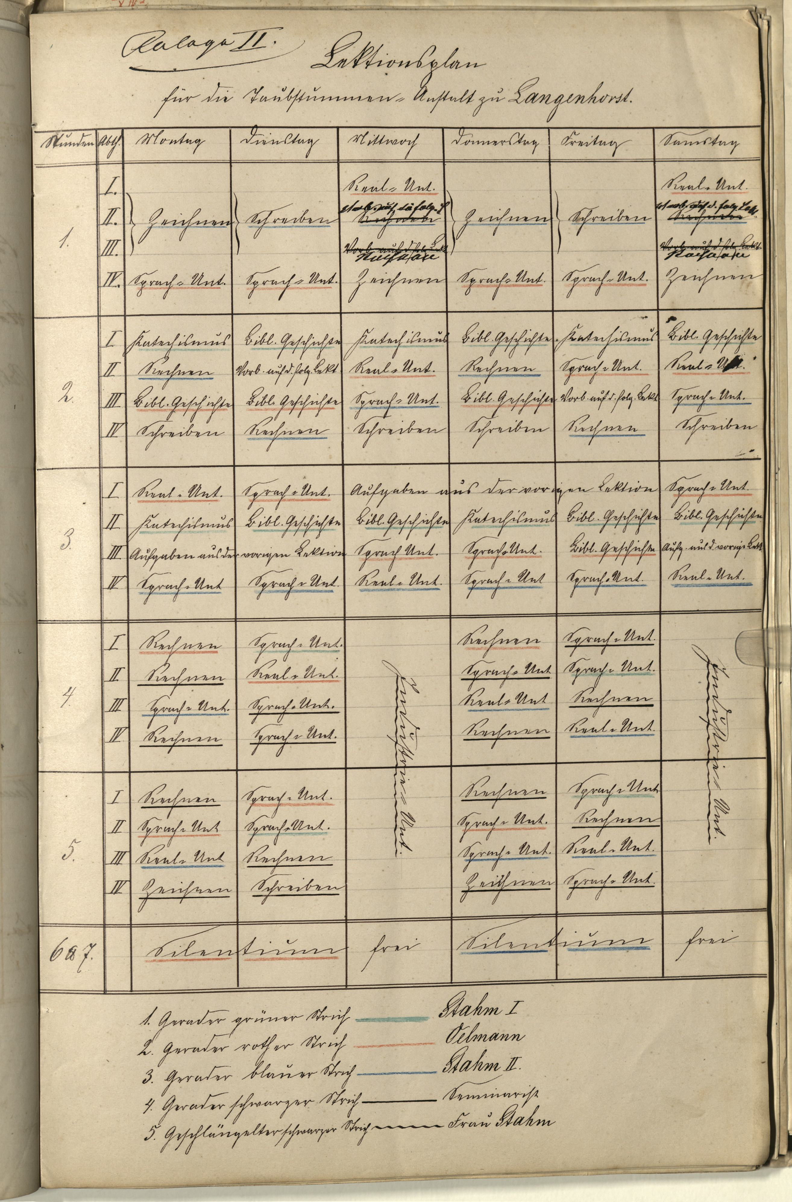 Der Stundenplan der Taubstummenanstalt Lagenhorst befindet sich im LWL-Archivamt für Westfalen. Zitierweise : LWL-Archivamt für Westfalen, Archiv LWL, Best. 558/29